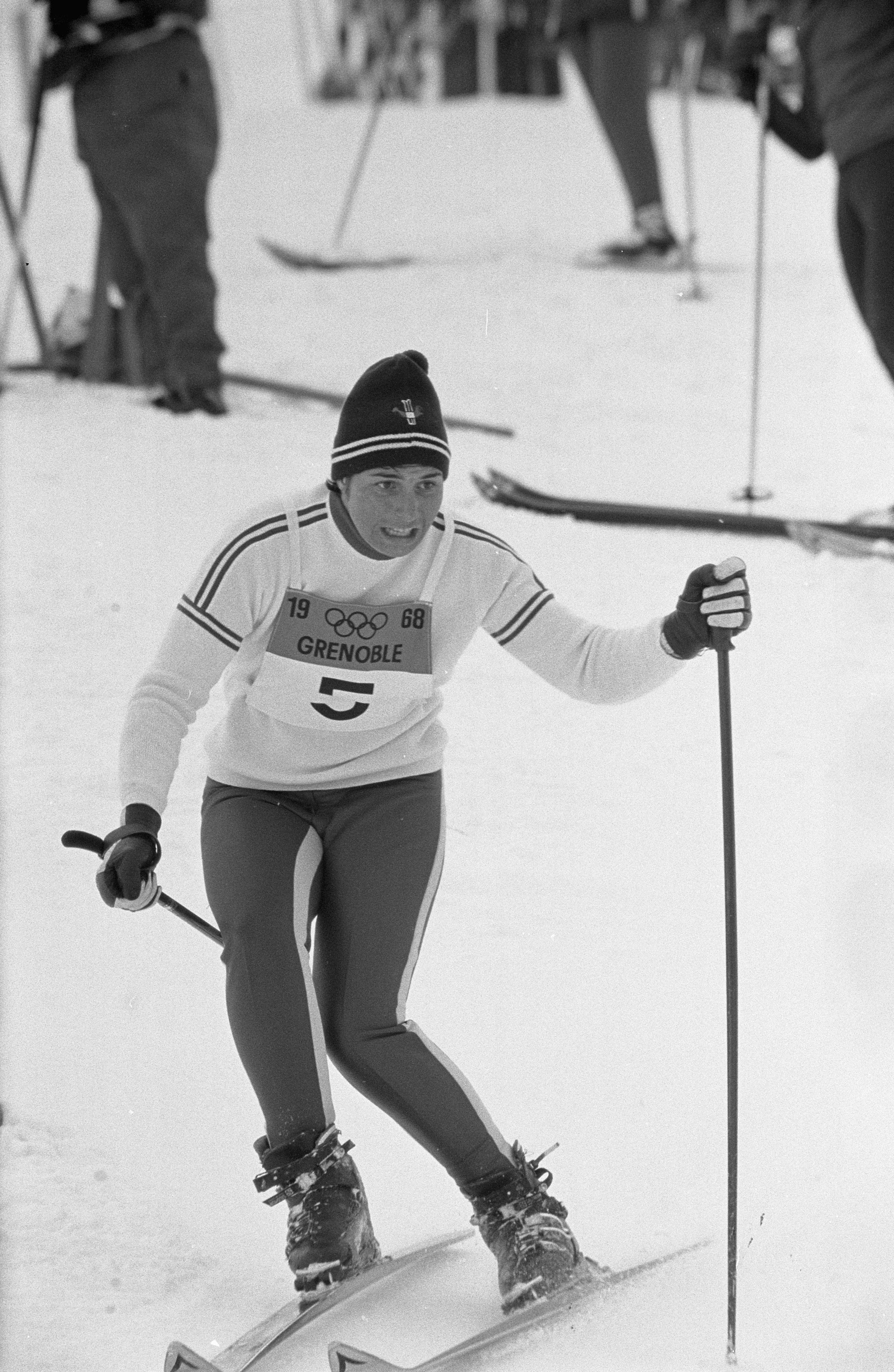 Collectie / Archief : Fotocollectie Anefo Reportage / Serie : [ onbekend ] Beschrijving : Olympische Spelen Grenoble, ski-slalom dames, Marielle Goitschel (Frankrijk) in aktie, wint goud Datum : 13 februari 1968 Locatie : Frankrijk, Grenoble Trefwoorden : skien, sport Persoonsnaam : Goitschel Marielle Fotograaf : Kroon, Ron / Anefo Auteursrechthebbende : Nationaal Archief Materiaalsoort : Negatief (zwart/wit) Nummer archiefinventaris : bekijk toegang 2.24.01.05 Bestanddeelnummer : 921-0884